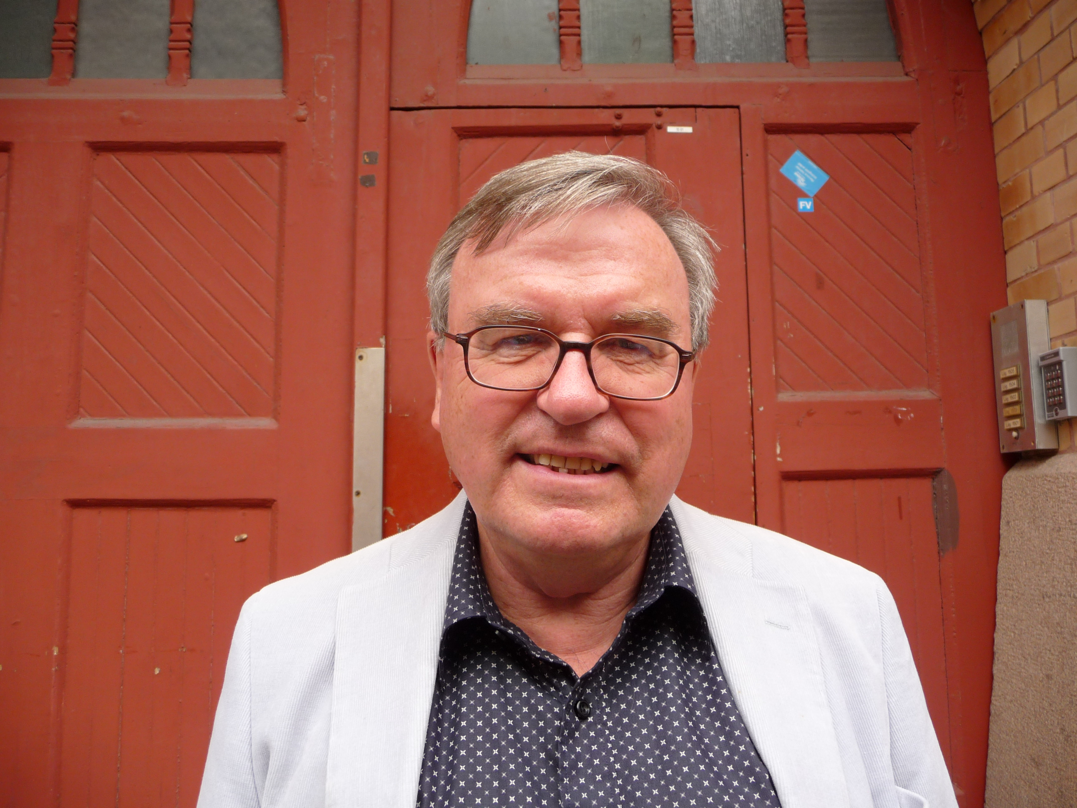 Folke Schimanski, september 09.